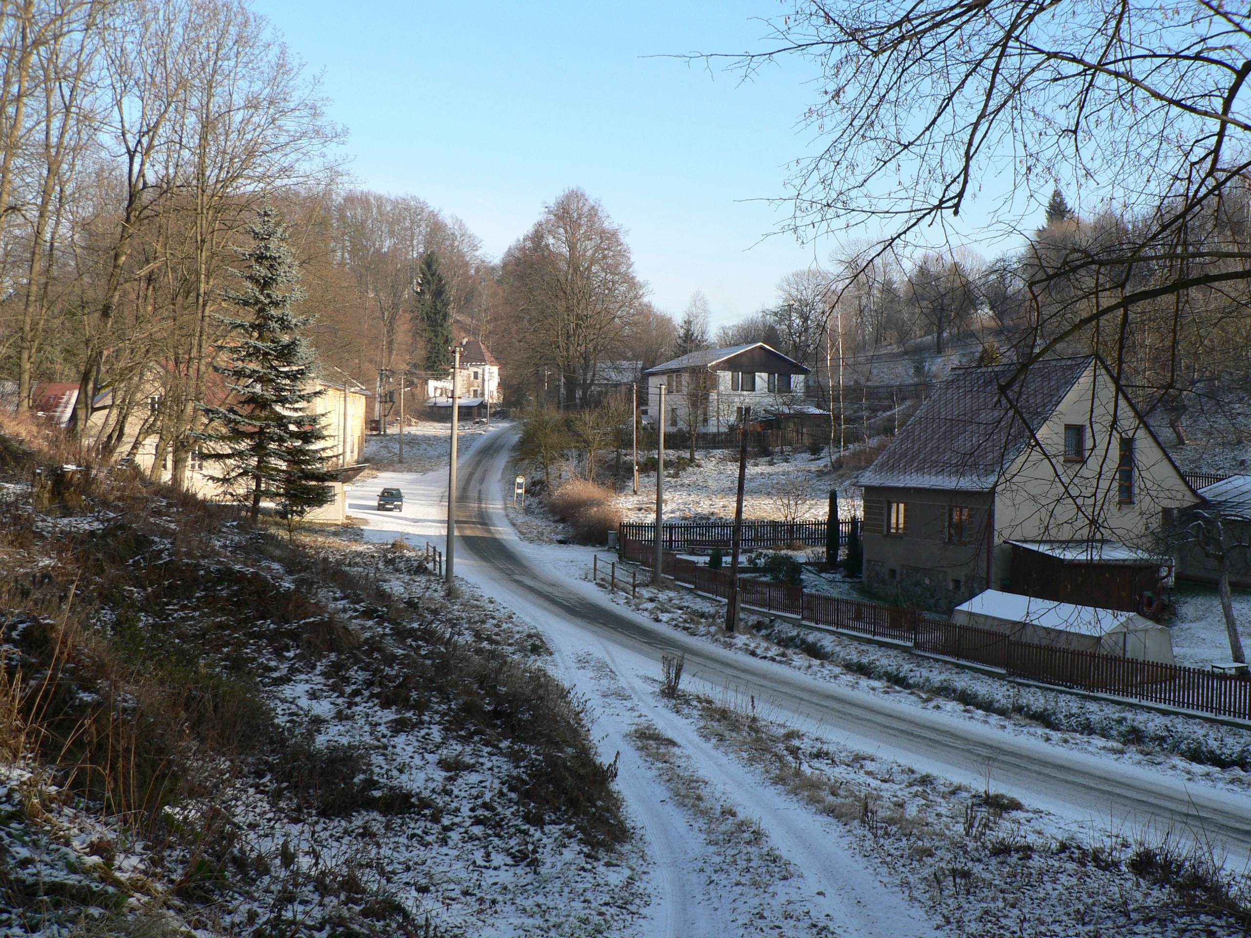 Dolní část obce